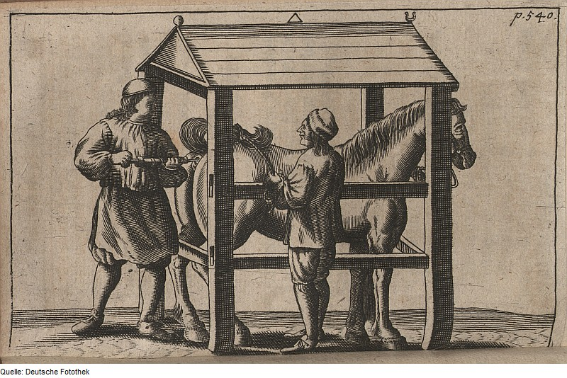 Original image description from the Deutsche Fotothek Landwirtschaft & Nutztierhaltung & Biologie & Pferd & Medizin & Krankheit